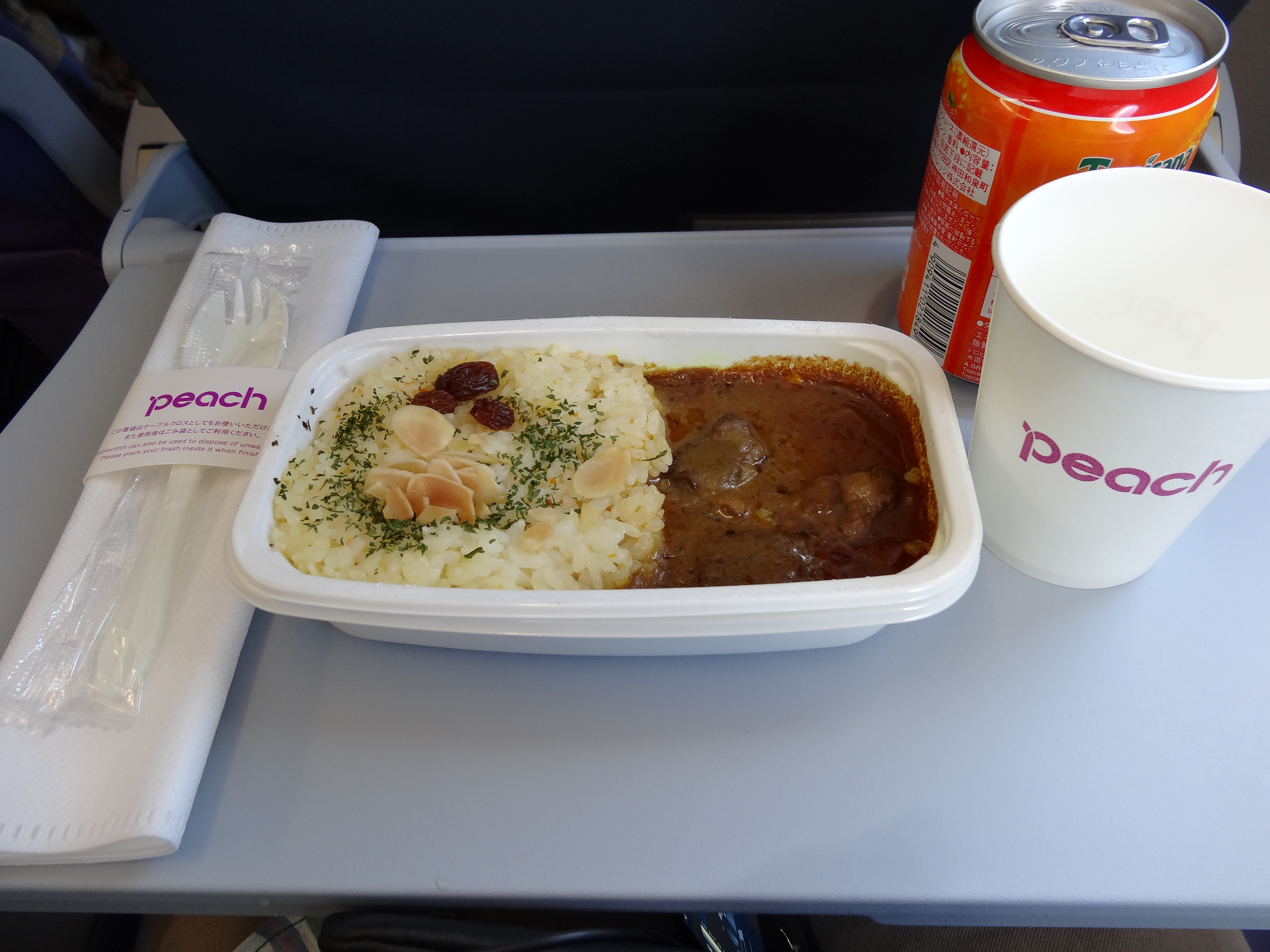 ビーフカレーコンボ （ピーチ・アビエーション、2012年10月撮影）